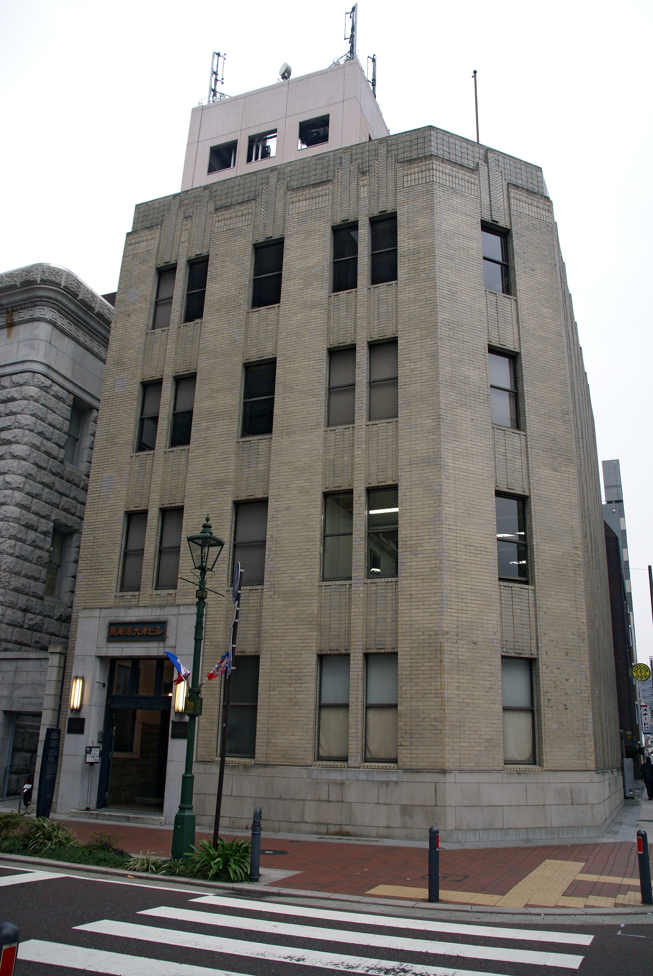 Bashamichi in Yokohama, Japan